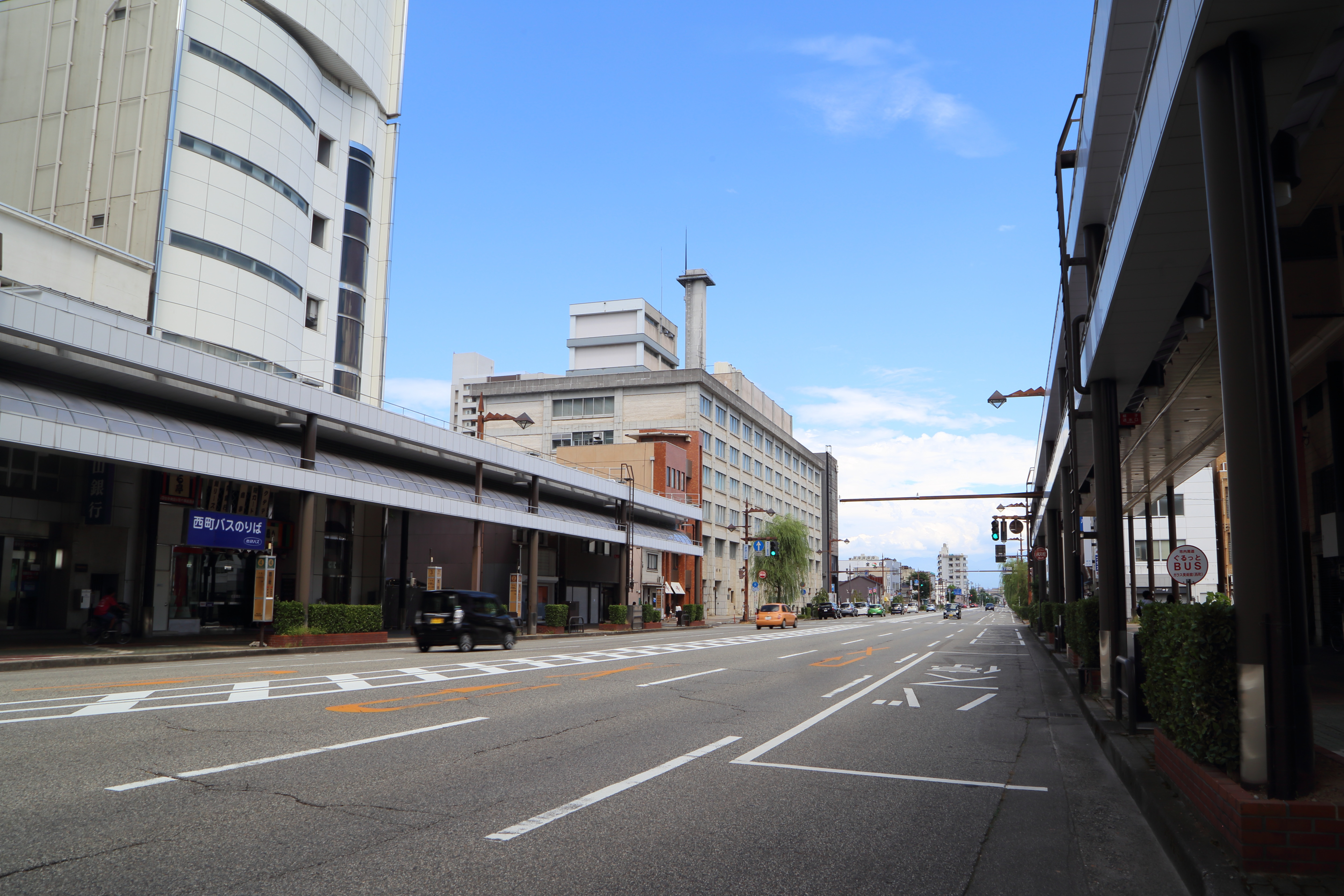 富山県道6号線を立山方面に望む。富山市西町バスターミナル。